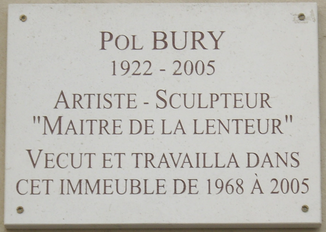 Plaque commémorative, 236 boulevard Raspail, Paris 14e. « Pol Bury, 1922-2005, artiste-sculpteur, "maître de la lenteur", vécut et travailla dans cet immeuble de 1968 à 2005. »